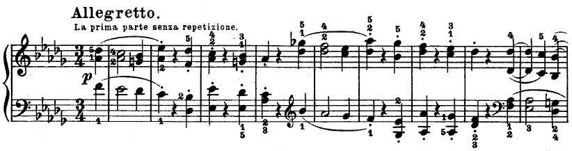 Mondschein Sonata Beethoven part 2